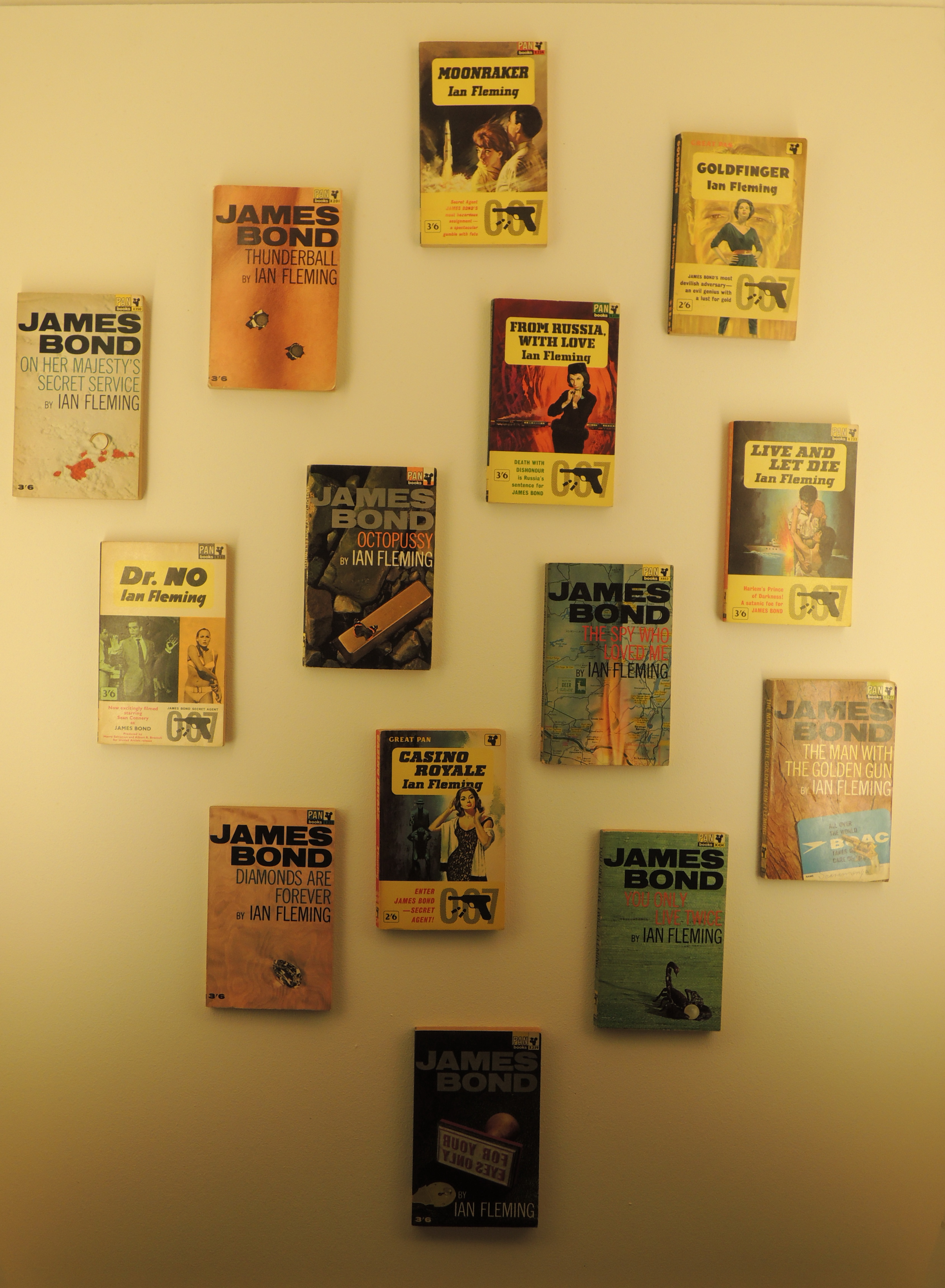 Выставка BOND BY GQ, Москва, 2012, Галерея на Солянке